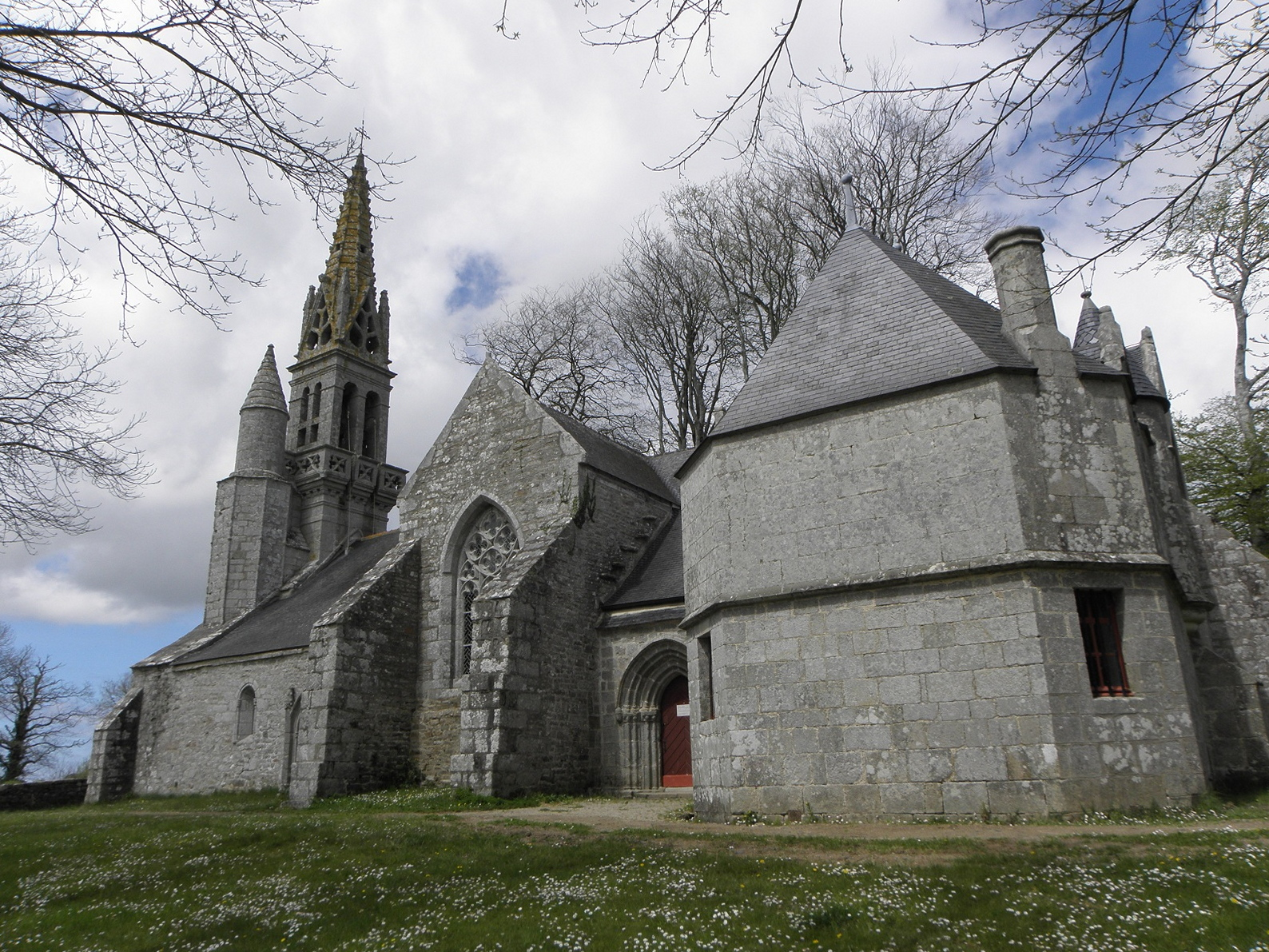 Flanc sud de la chapelle Notre-Dame-de-Kérinec en Poullan-sur-Mer (29).